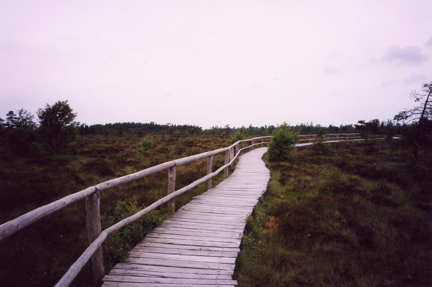 Schwarzes Moor in der Rhön